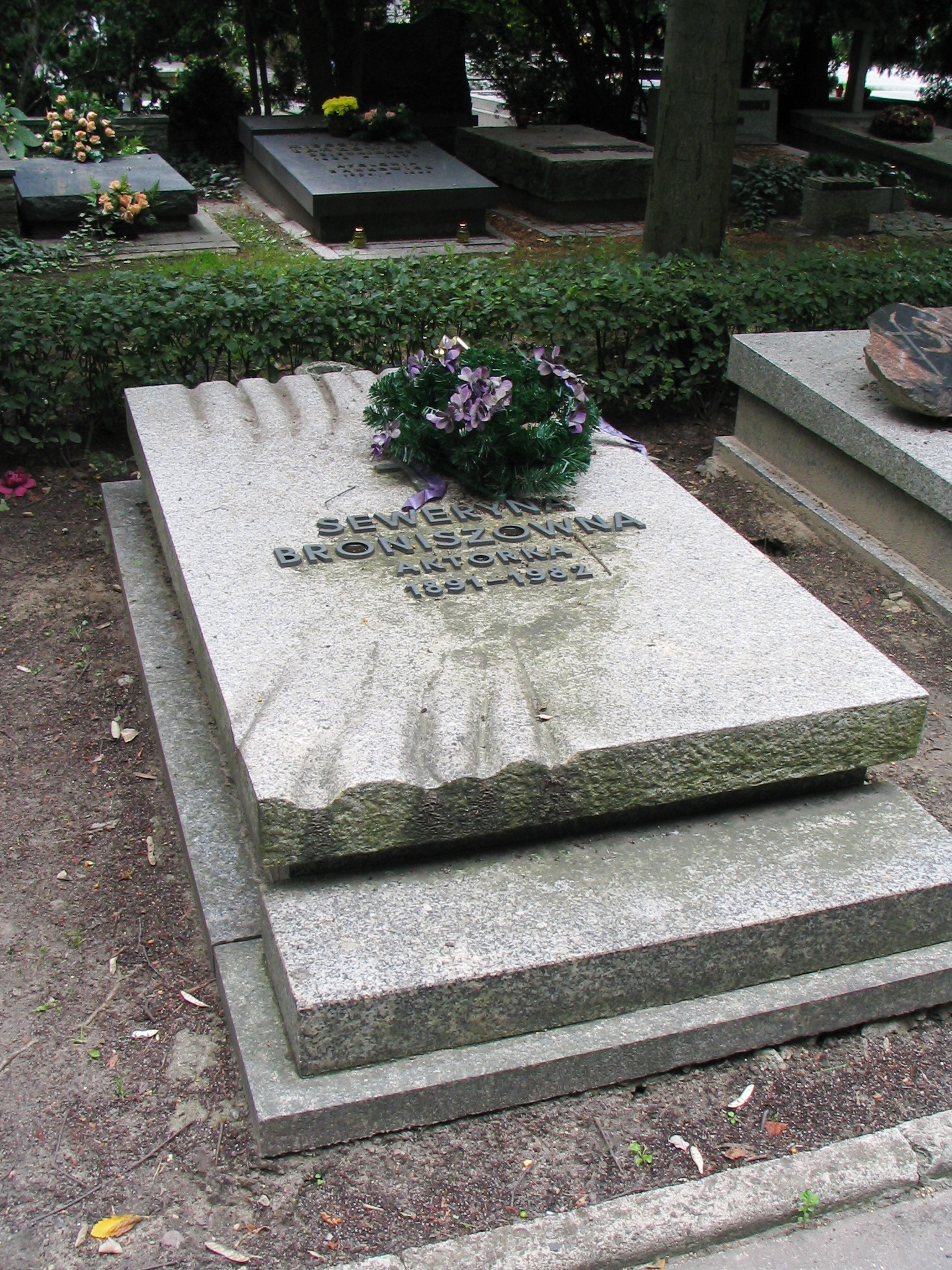 Grób Seweryny Broniszówny